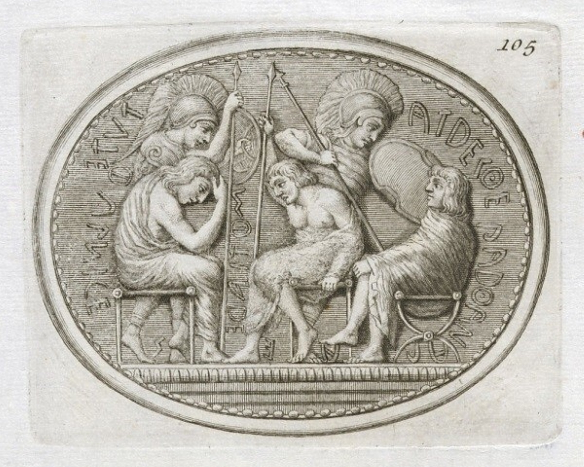 Etruskischer Skarabäus, sog. Stosch'scher Stein Fünf Helden mit Namensbeischriften aus der Sage "Sieben gegen Theben" Kupferstich aus den Monumenti antichi inediti von Johann Joachim Winckelmann